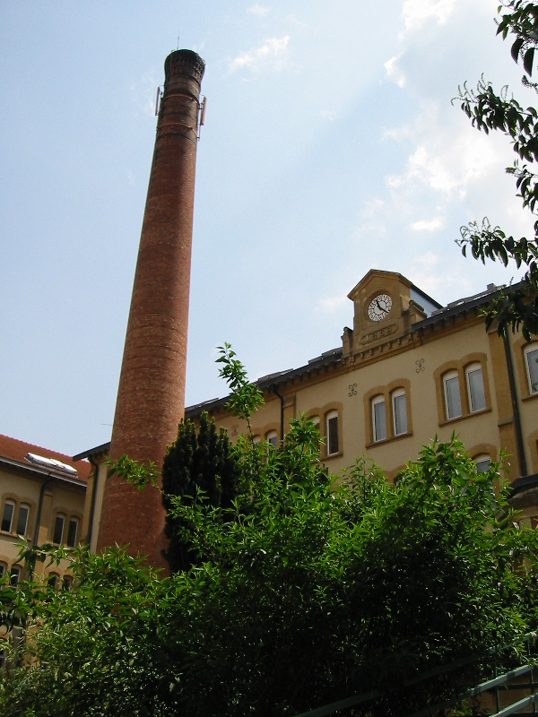 Ancienne manufacture des tabacs de Nancy, Lorraine, France. reconvertie en Médiathèque, théâtre et conservatoire de musique.